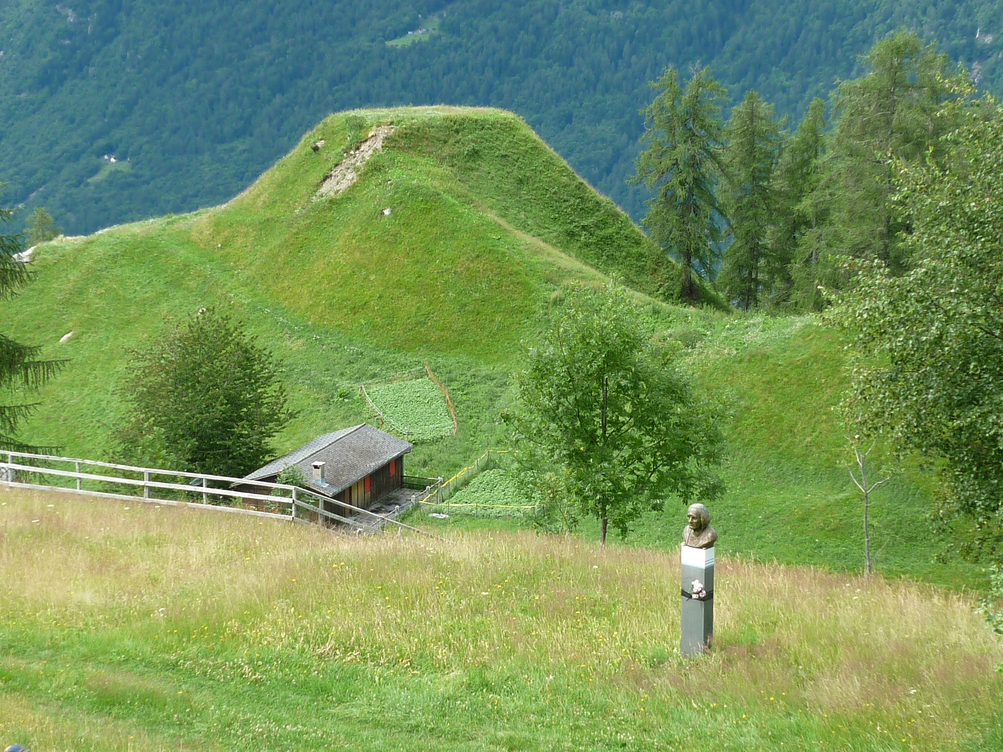 Gekröpfte Pyramide "piramide mozza" oder Kastél, Fundort der antiken Astronomietafeln von Dagro, Malvaglia TI, Schweiz